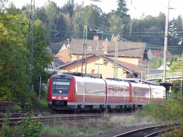 Bahnhof Ottweiler; ausfahrender Regionalexpress (Baureihe 612), Ottweiler, Saarland, Deutschland.